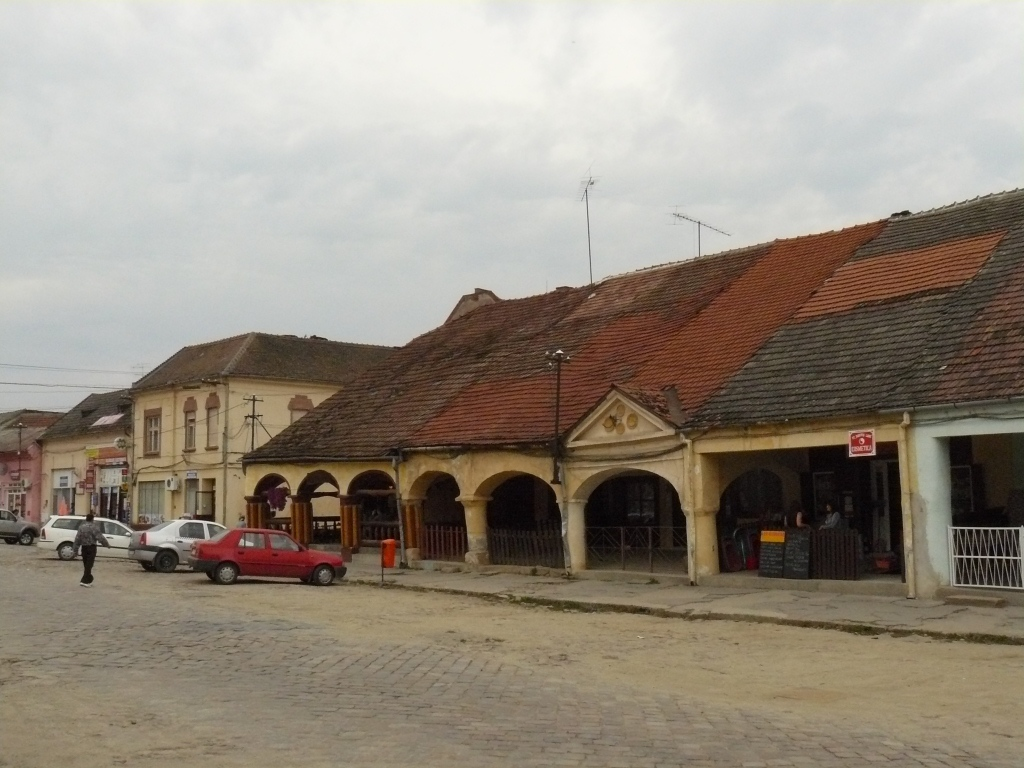 Bazarul "Sub dughene" (Bazarul Turcesc), azi locuințe și spații comerciale